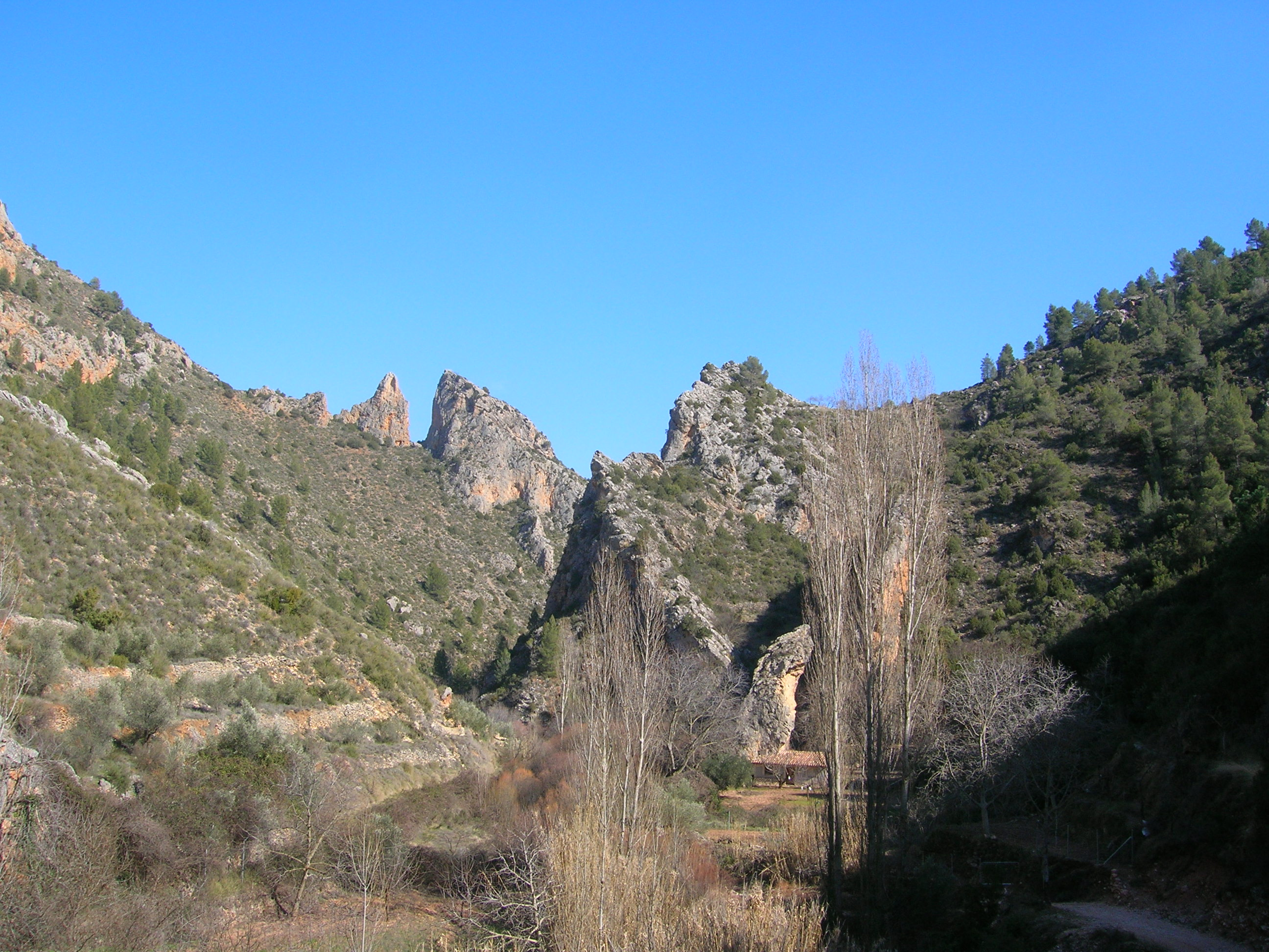 Inmediaciones del paraje del Batanero (o El Batán), en Bogarra, Albacete, España.